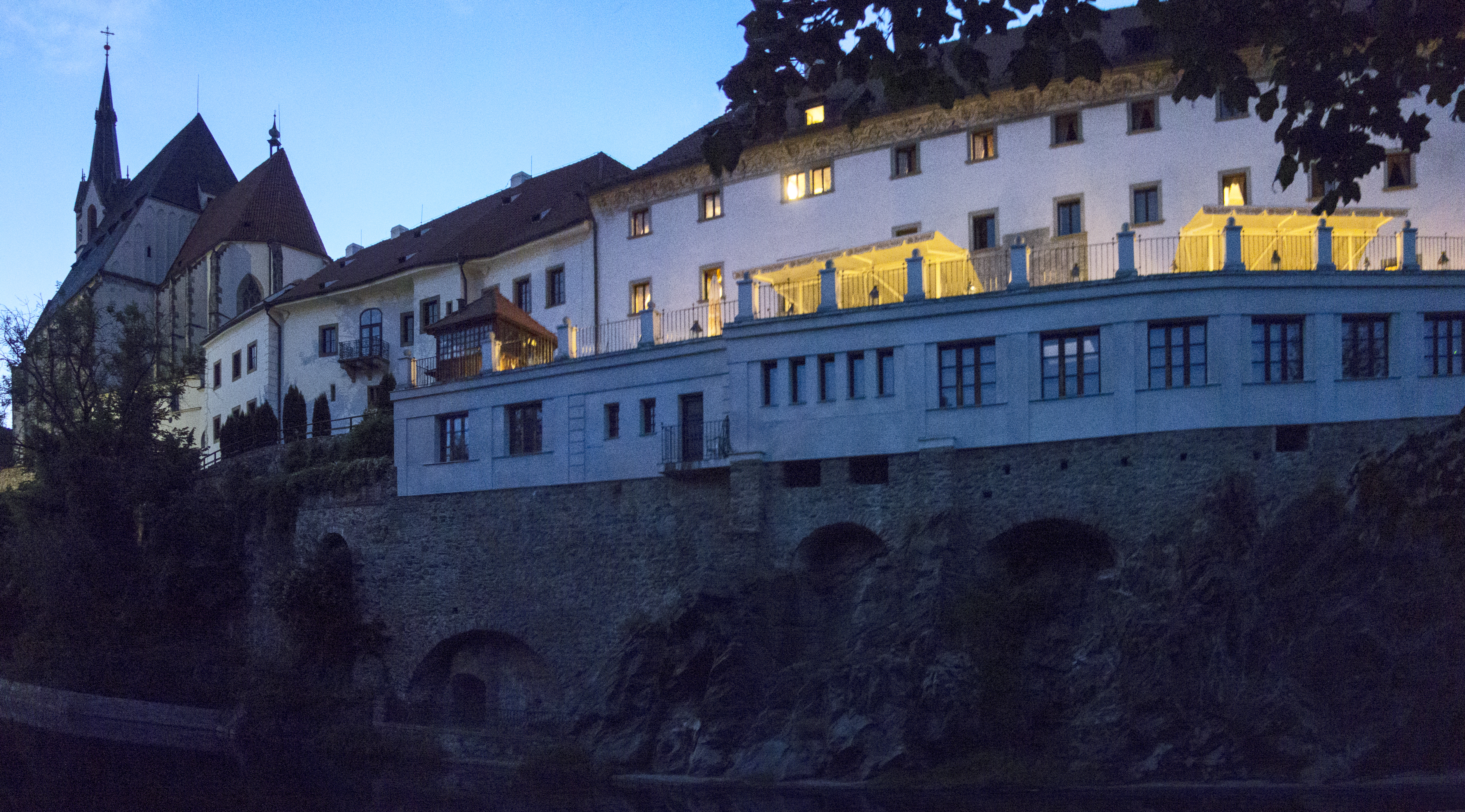 Jezuitská kolej (Český Krumlov)